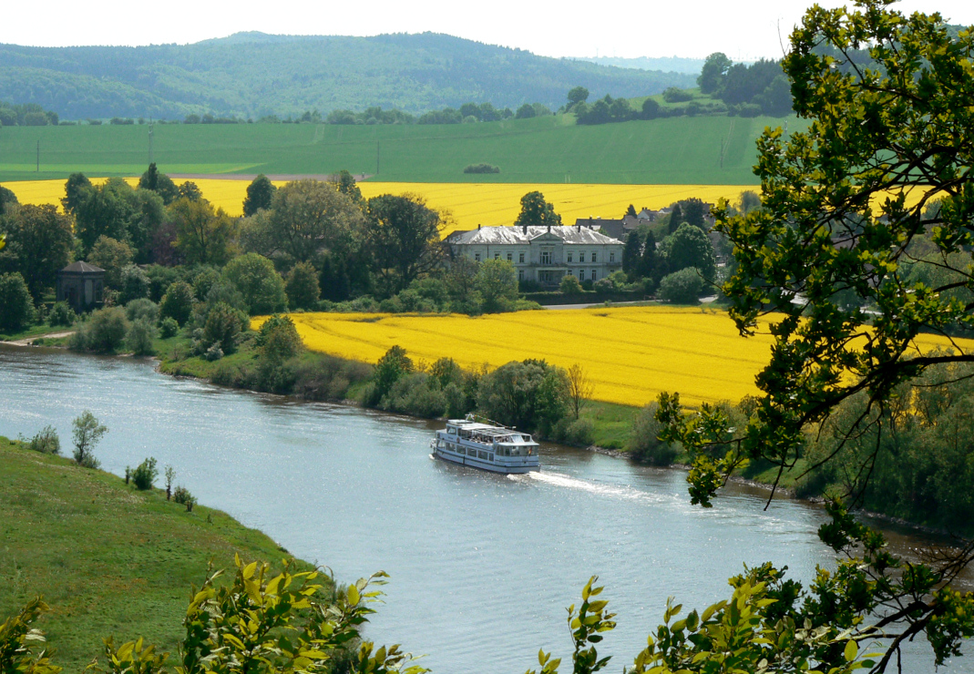 Gut Ohr vom Ohrberg